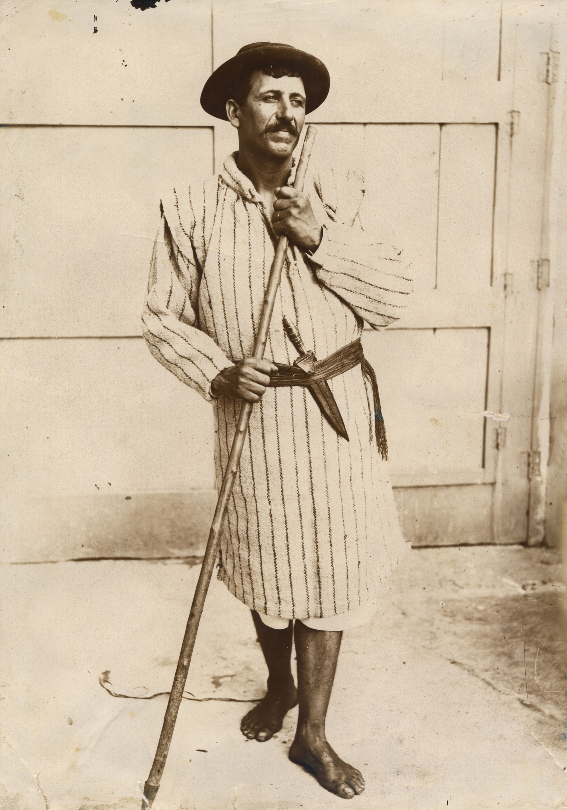 Fotografía del campesino Benito "El Fraile" del municipio de Gáldar llevando sujeto al fajín el tradicional "cuchillo canario", característico de la isla de Gran Canaria.